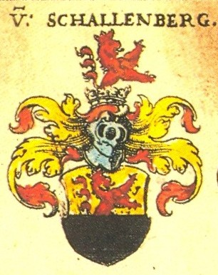 Wappen Schallenberg aus: Johann Siebmacher: New Wappenbuch eingescannt aus: Horst Appuhn (Hrsg.), Johann Siebmachers Wappenbuch. Die bibliophilen Taschenbücher 538, 2. verb. Aufl , Dortmund 1989 Österreichische Blatt 37